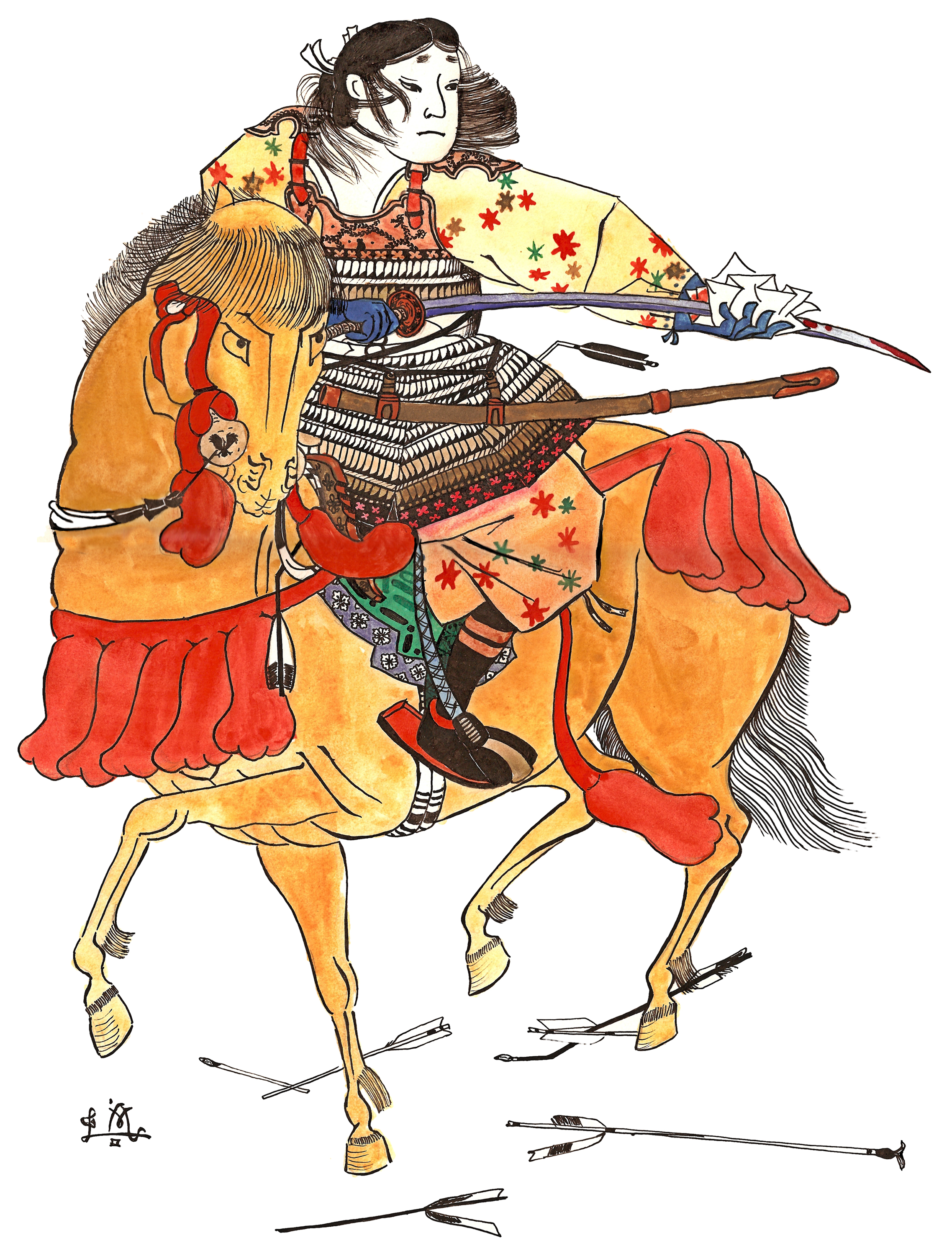 Samurai rider in battle